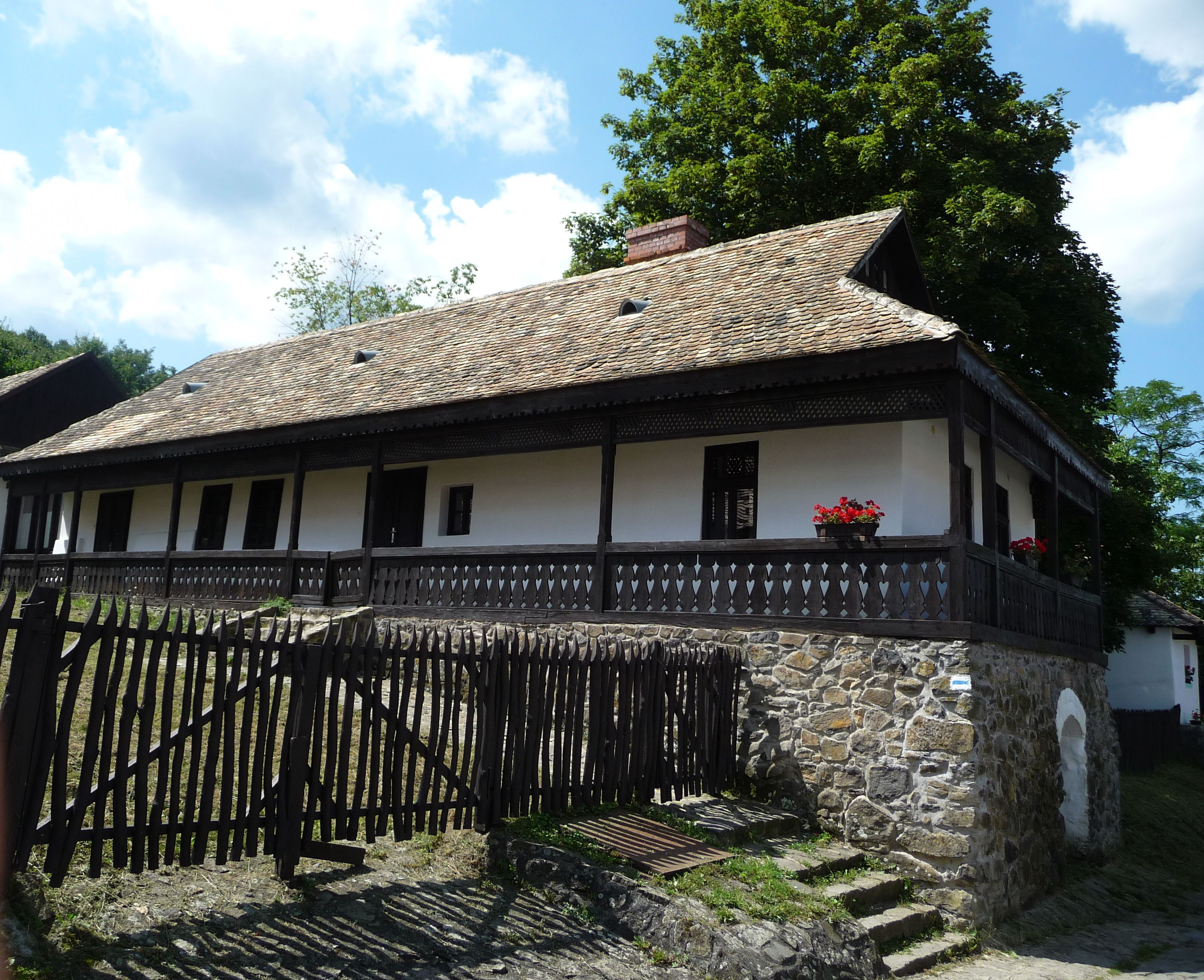 Hollókő, Kossuth u. 108.